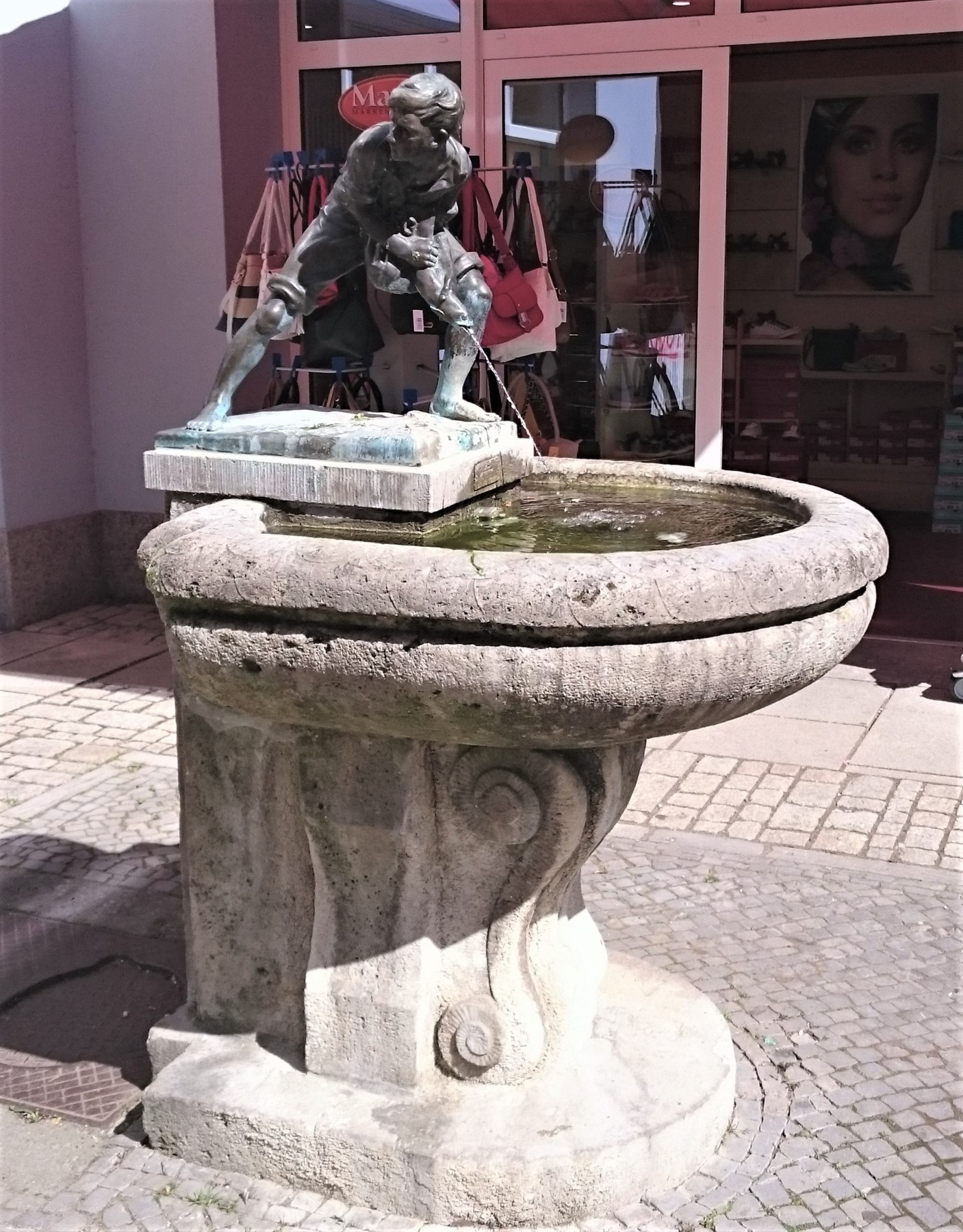 Fischdieb-Brunnen in der Georgstraße in Meiningen